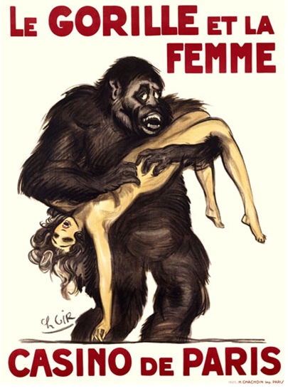 Offset printed poster for La Gorille et la femme. Casino de Paris designed by Charles Gir [Exposition internationales des arts décoratifs].